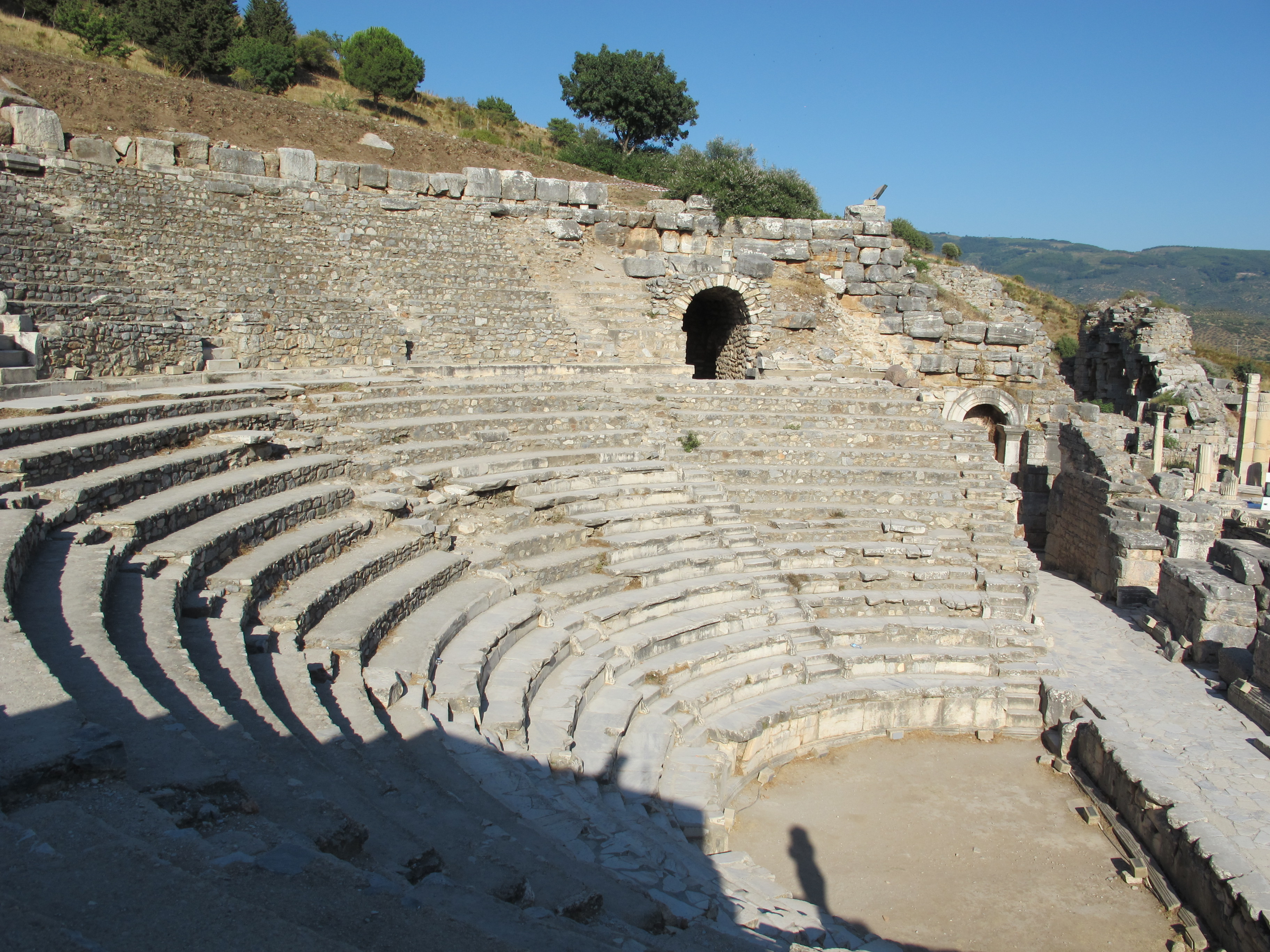 Efeso, odeon